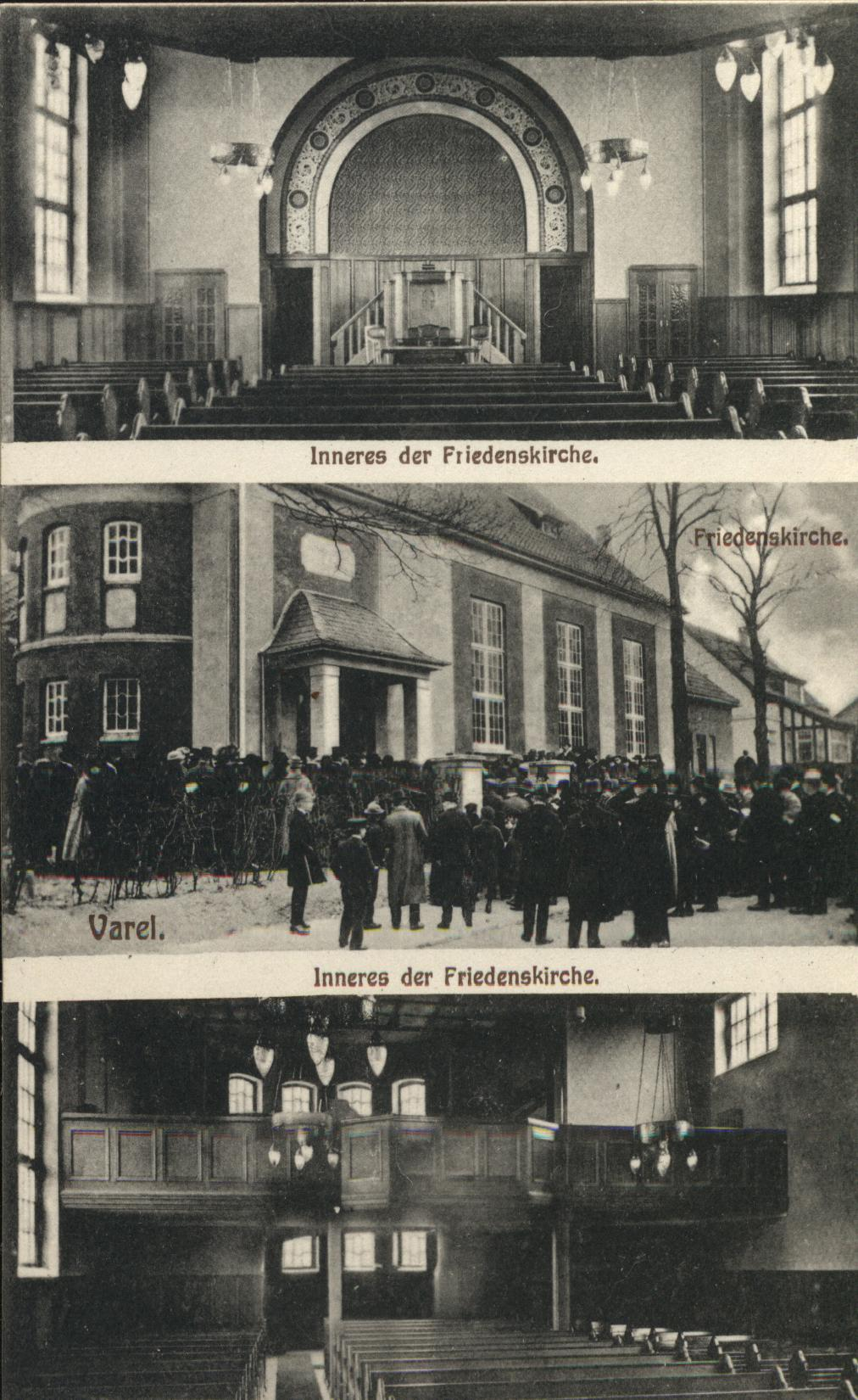 Ansichtskarte mit Innen- und Außenansicht der baptistischen Friedenskirche Varel (vor 1922)